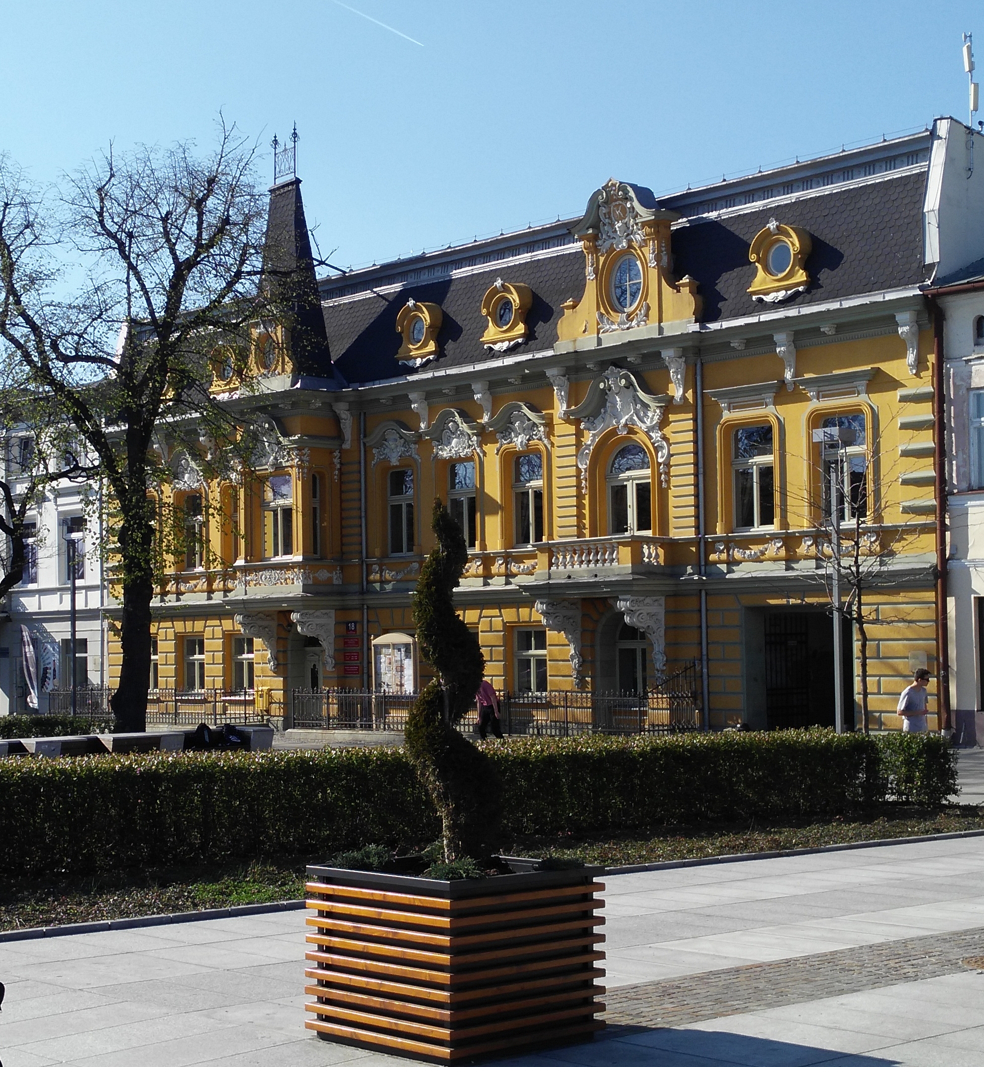 Kamienica fabrykancka rodziny Knothe w Tomaszowie Mazowieckim, zbudowana w 3-iej dekadzie XIX wieku, pl. Kościuszki (wówczas, św.Józefa)